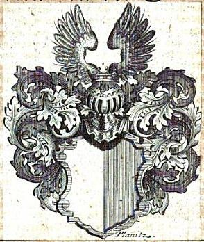 Das Wappen der früheren Adelsfamilie Edle von der Planitz, abgebildet in Valentin König: Genealogische Adels-Historie Oder Geschlechts-Beschreibung Derer im Chur-Sächsischen und angräntzenden Landen ... ältesten und ansehnlichsten Adelichen Geschlechter und ... Hoch-Gräflichen Häuser, Teil 1, Seite 710: Genealogisch-Historische Beschreibung, Nebst denen Stamm- und Ahnen-Teffeln des Alt-Adlichen Geschlechts derer Edlen von der Planitz. Verlag Deer. Leipzig 1727 Digitalisat in der Bayerischen Staatsbibliothek München [1], abgerufen am 7. August 2014